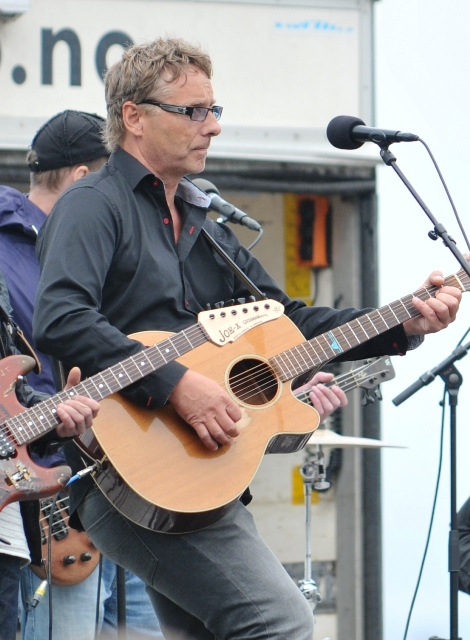 Leif Nilsen under en utendørs promo-konsert med Mods i Stavanger 30.6.2012